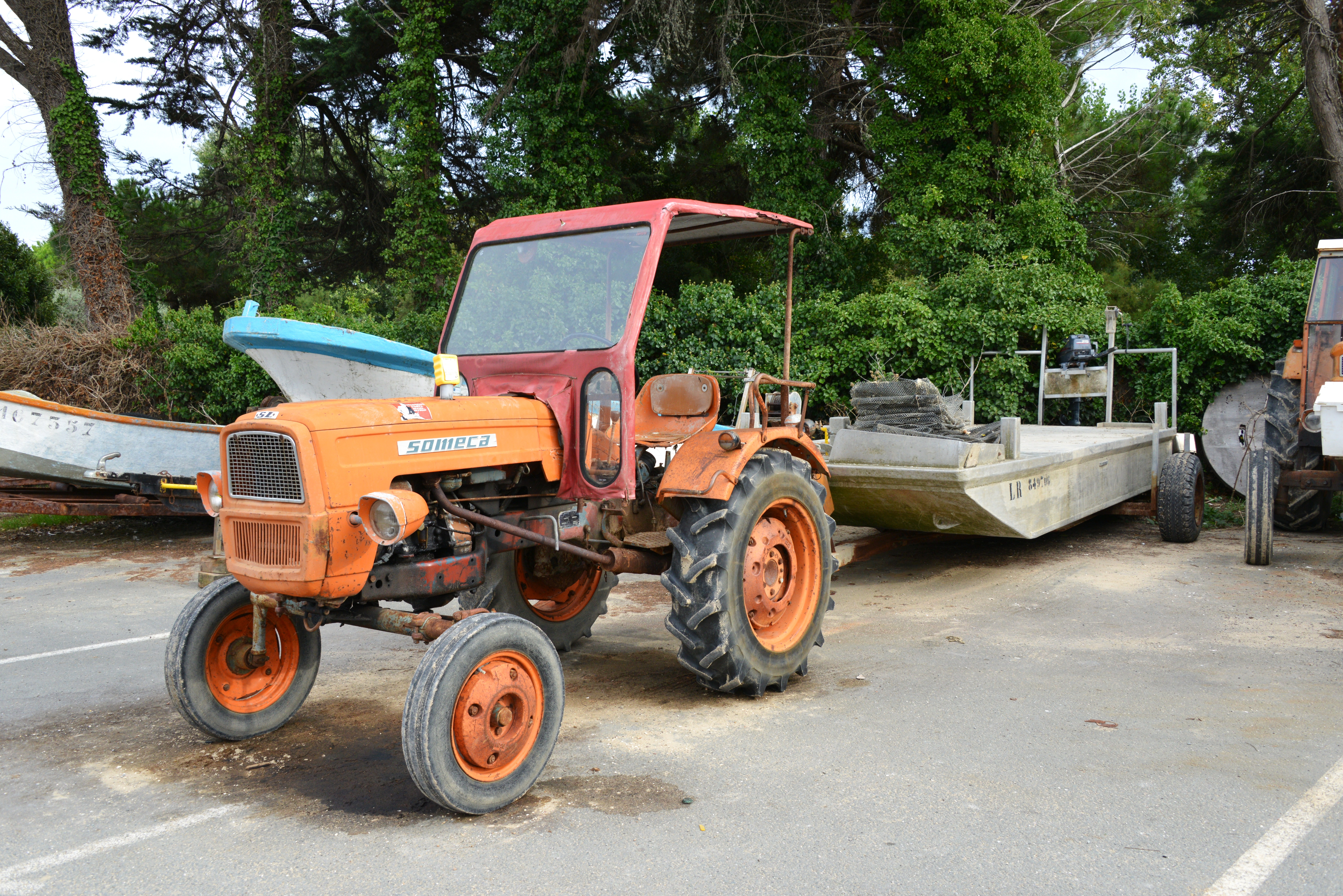 Un tracteur agricole Someca 215 (SL) utilisé pour tracter une remorque à chaland ostréicole. Ce tracteur est rouillé car il est laissé dehors et attaqué par l’eau de mer. Les Portes-en-Ré, parking de La Patache, Île de Ré, Charente-Maritime, France.